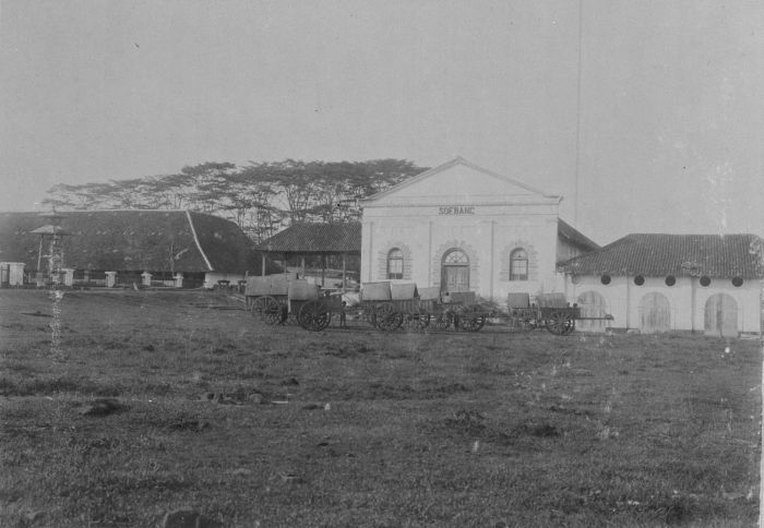 Foto. Fabriek te Soebang, West-Java.